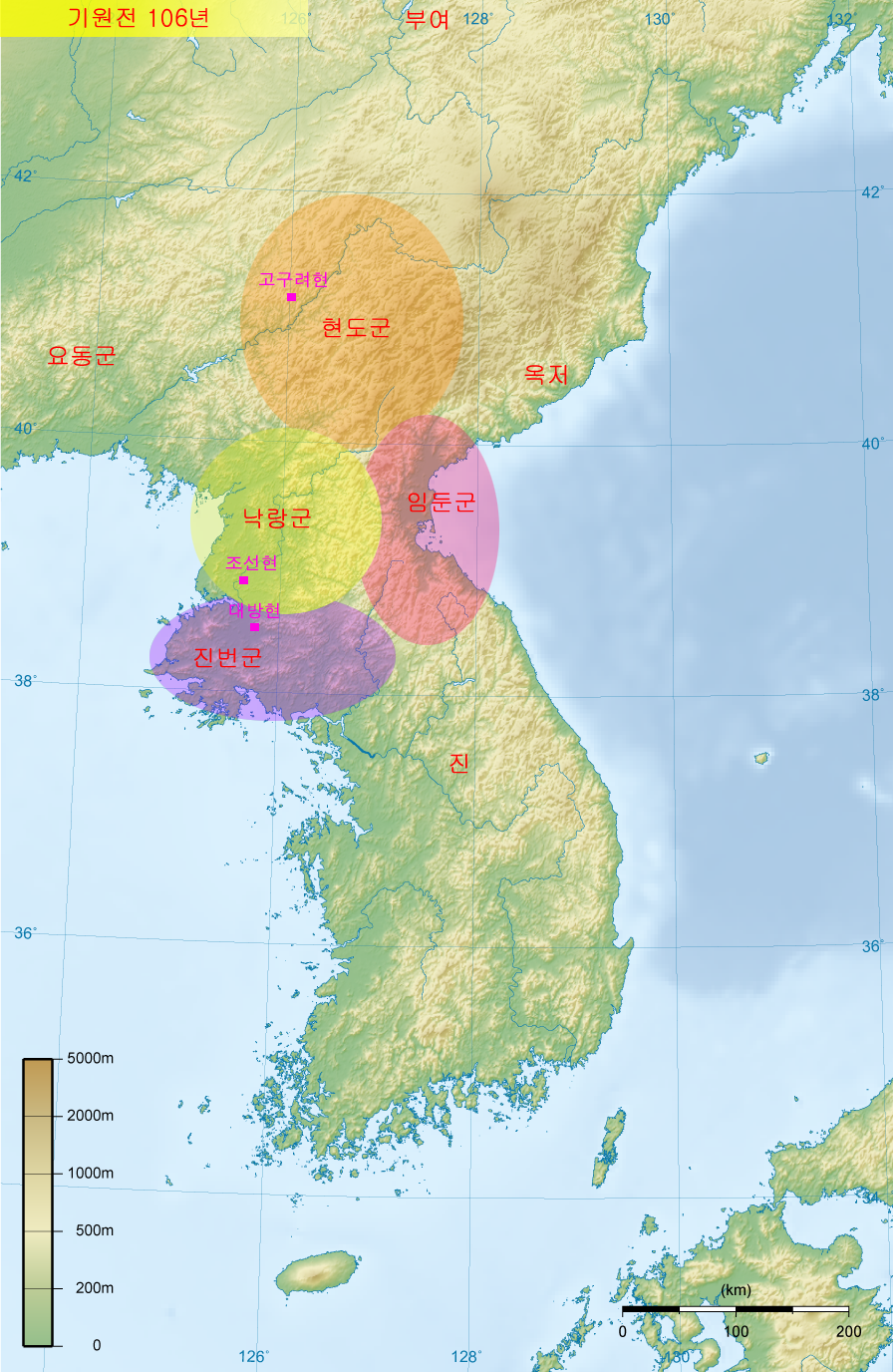 한군현의 지도